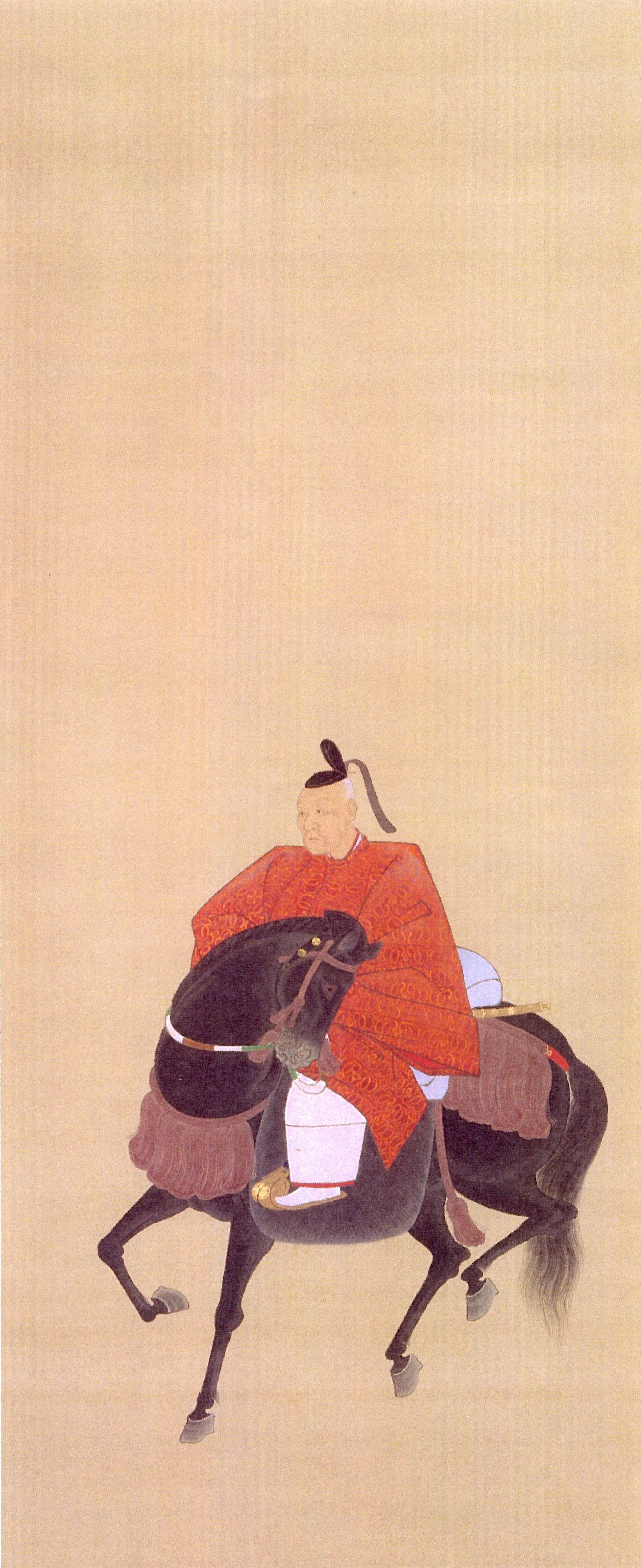 成瀬正泰の肖像。